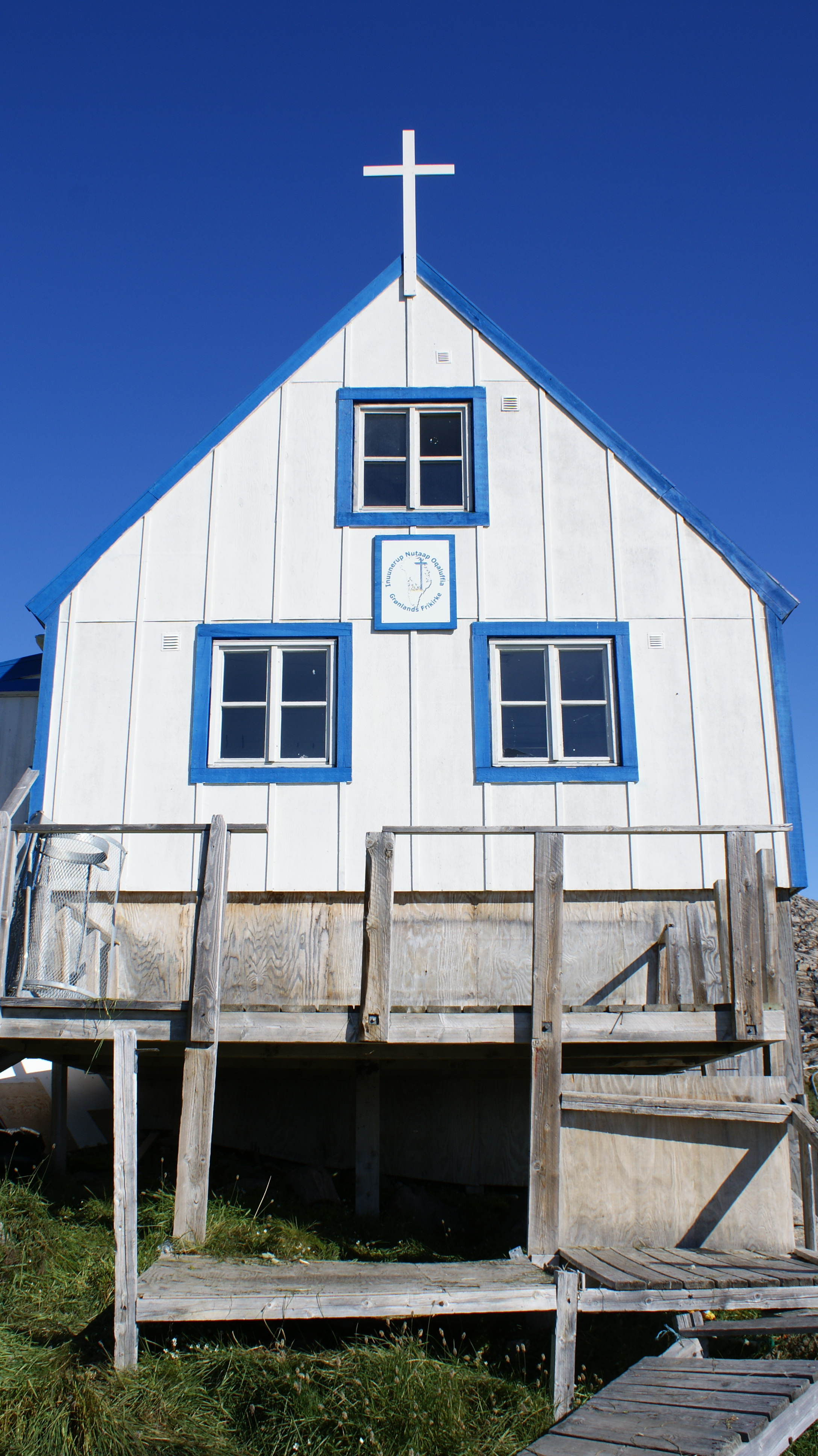 Inuunerup Nutaap Oqaluffia (Grønlands Frikirke) in Kullorsuaq, Melville Bay, Upernavik Archipelago, Greenland.